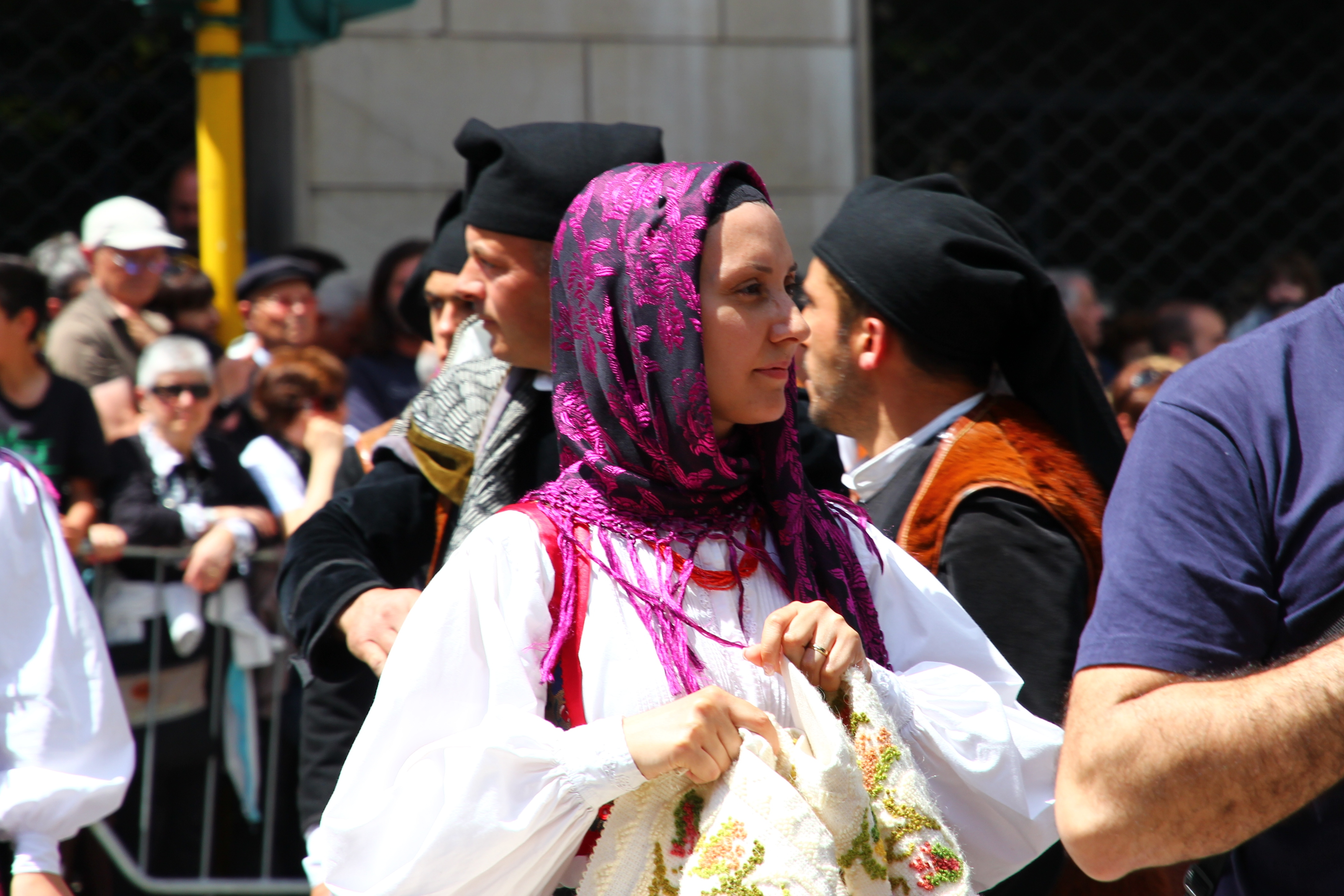 Cavalcata Sarda 2013 (Sassari)